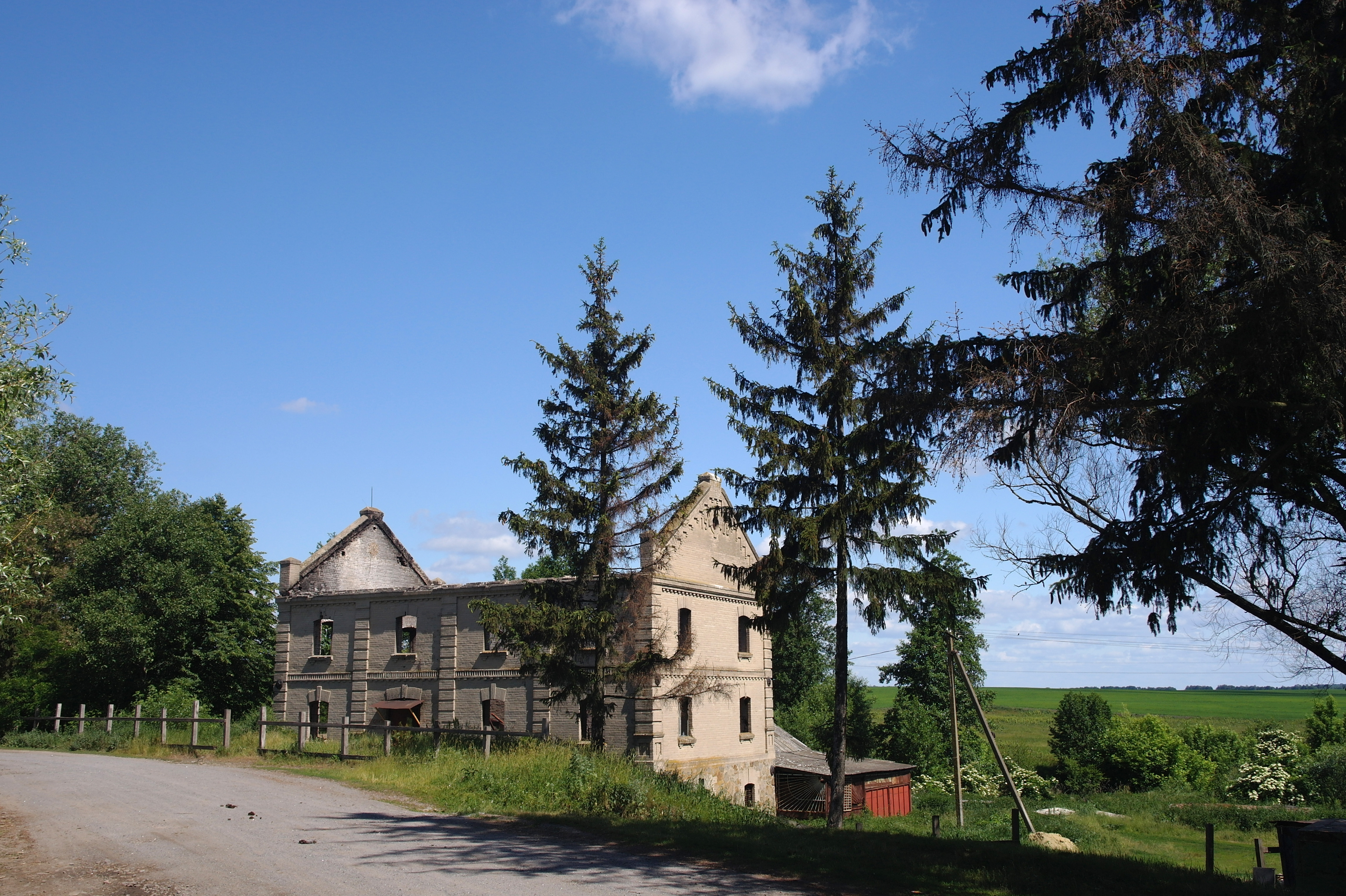 Городківка. Водяний млин